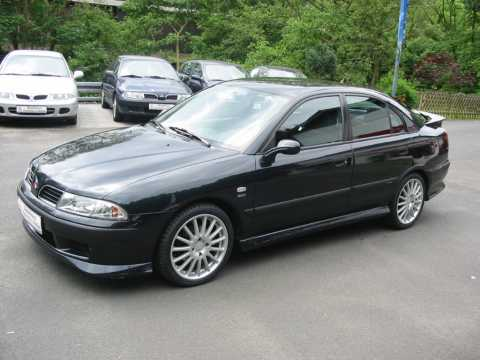 Mitsubishi Carisma